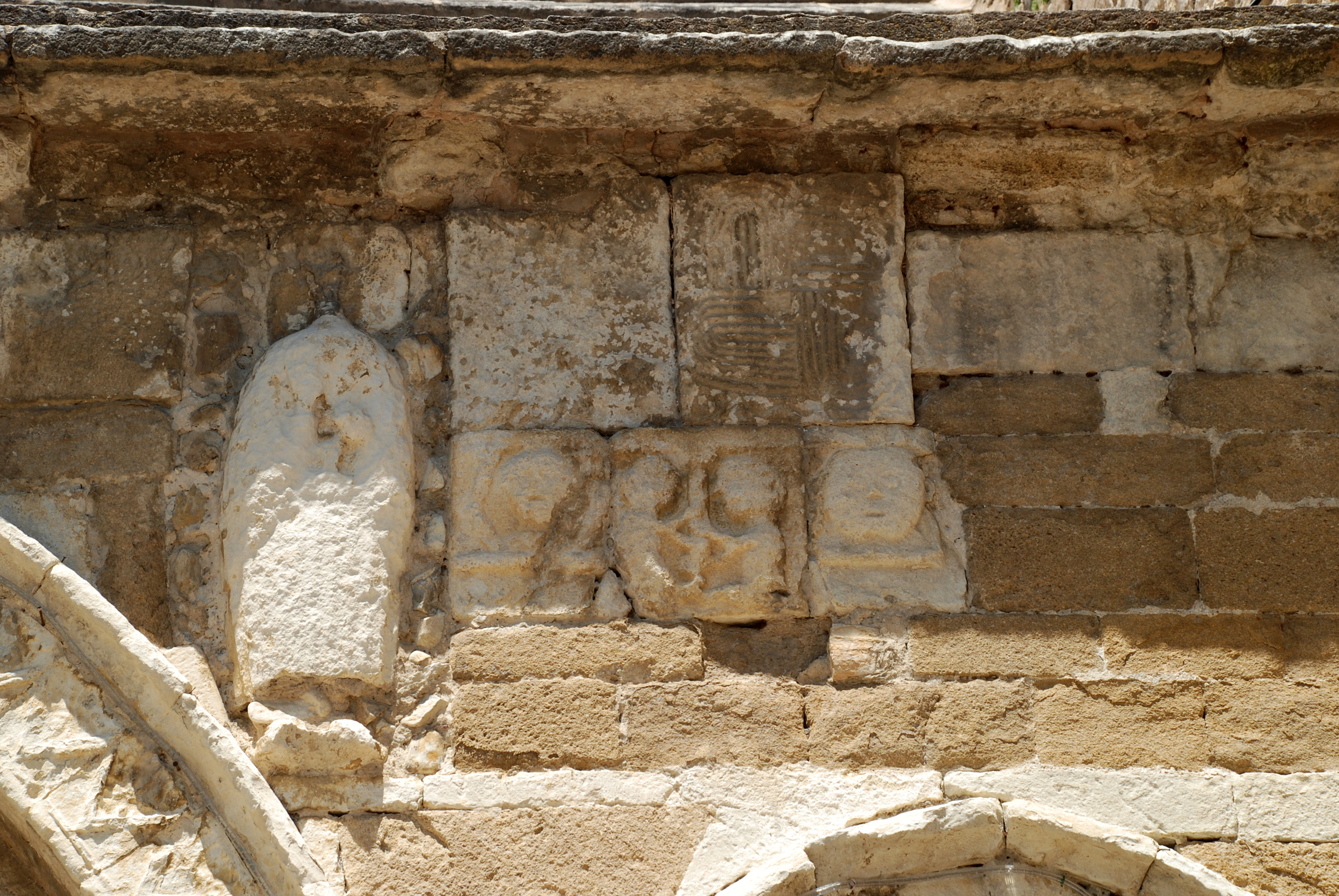 France - Provence - Église Notre-Dame-de-Nazareth de Valréas